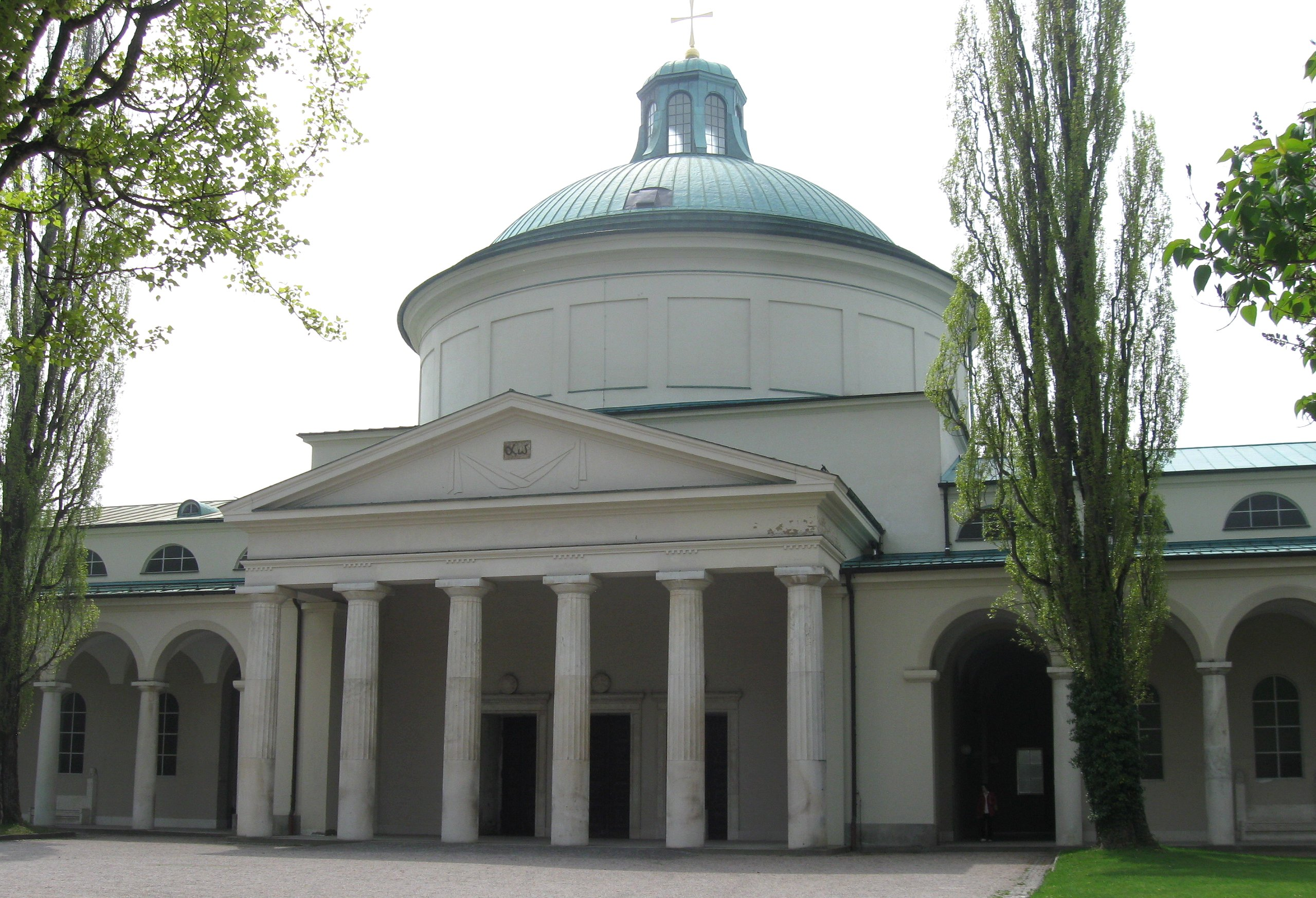 Aussegnungshalle im Ostfriedhof, München